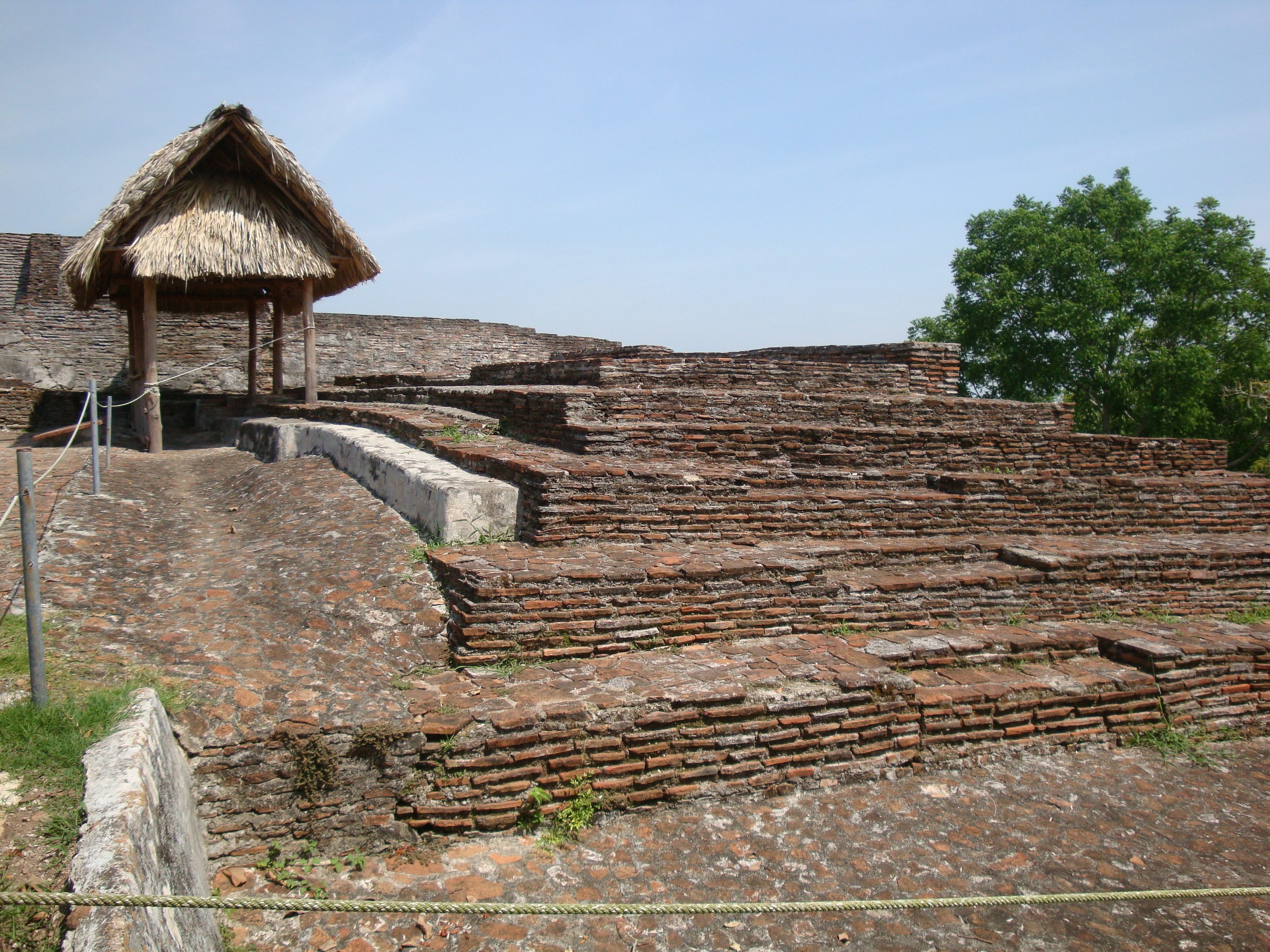 Estructura 4. Ubicada en el interior de la Gran Acrópolis en la ciudad maya de Comalcalco, Tabasco, México.